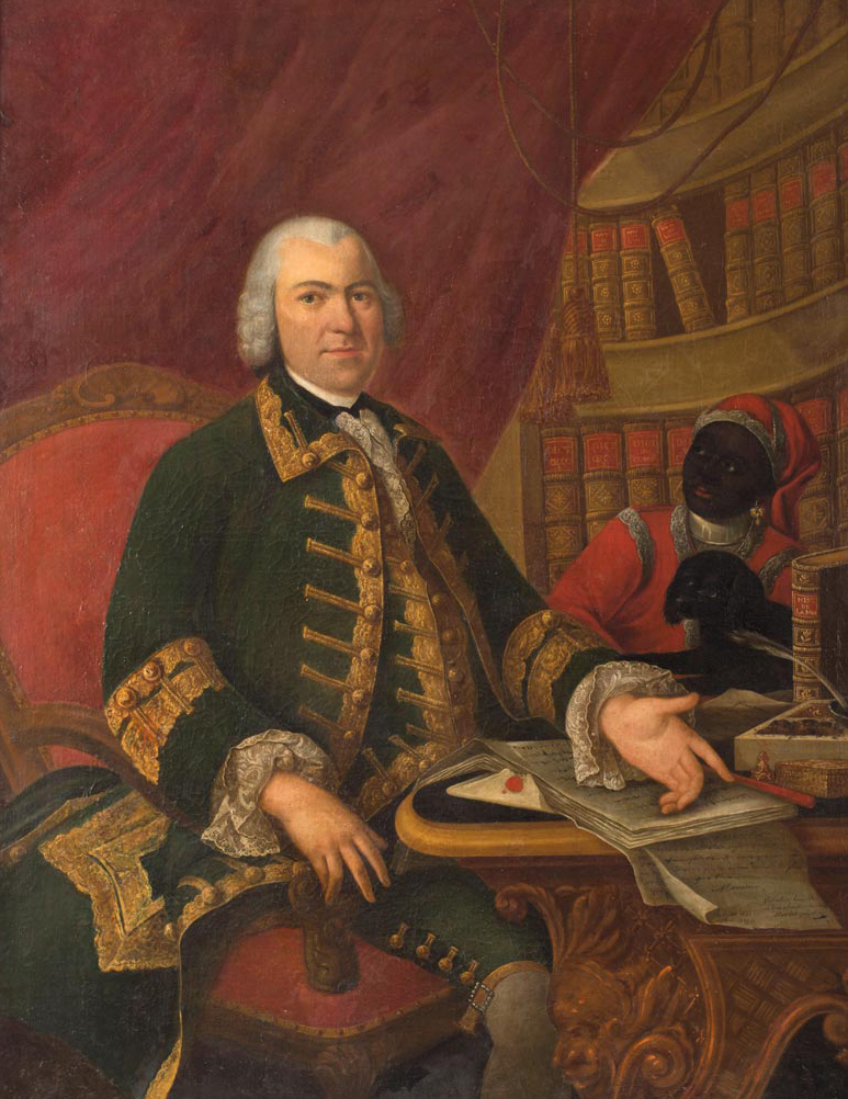 Portrait de Dominique-René Deurbroucq (1715-1782), Ecuyer. Négociant, consul de Nantes (1758), conseiller secrétaire du roi Maison et Couronne de France (1768), juge consulaire (1775). Peints en 1753 par Pierre-Bernard Morlot